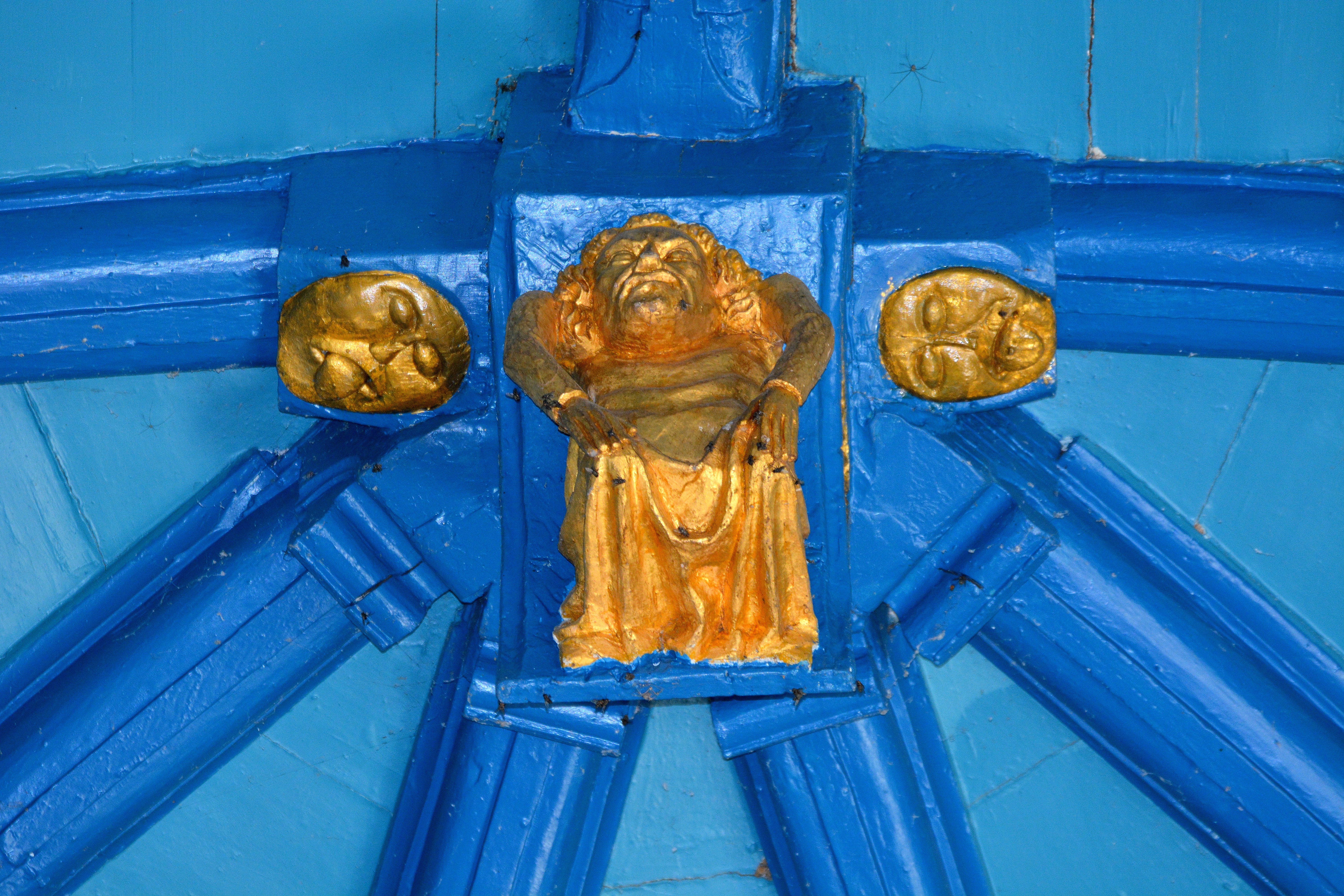 Boksum, Sint-Margrietkerk, gewelf koor